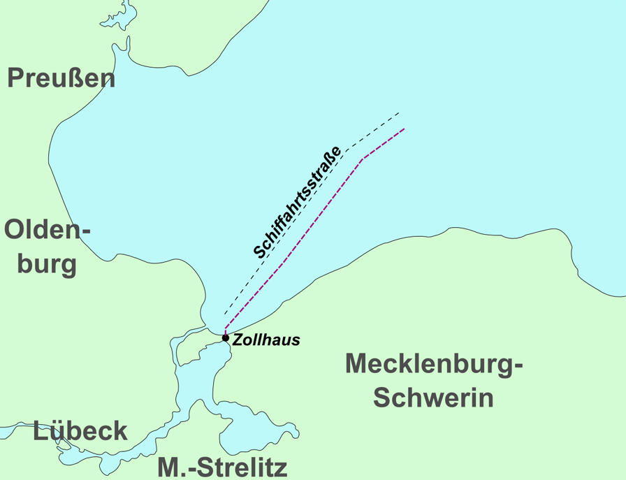 Karte der Lübecker Bucht; Lübecker-Bucht-Fall; Gebietshoheit